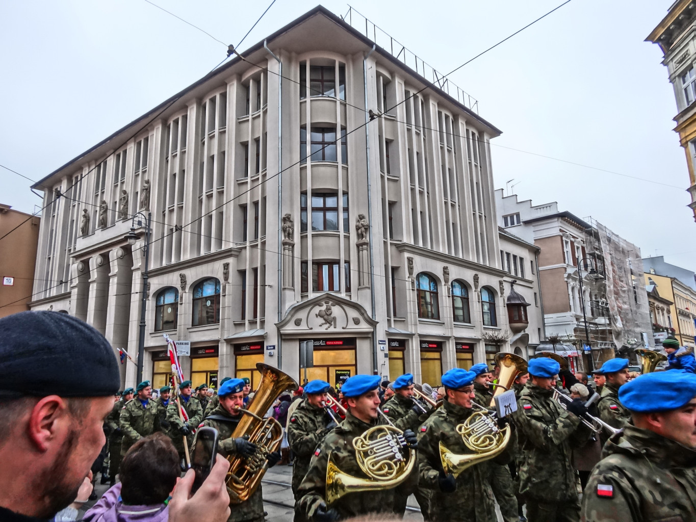 Dom Towarowy Jedynak, ul. Gdańska 15 w Bydgoszczy (zbud. 1910)